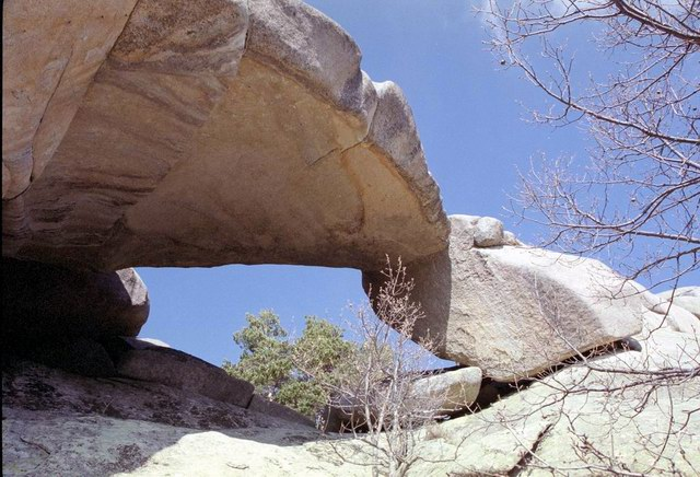 Puente de los Pollos. La Pedriza de Manzanares Más conocido como Puente de los Poyos (con Y). Podéis ver la discusión al respecto de si es Poyos o (menos probable) Pollos aquí